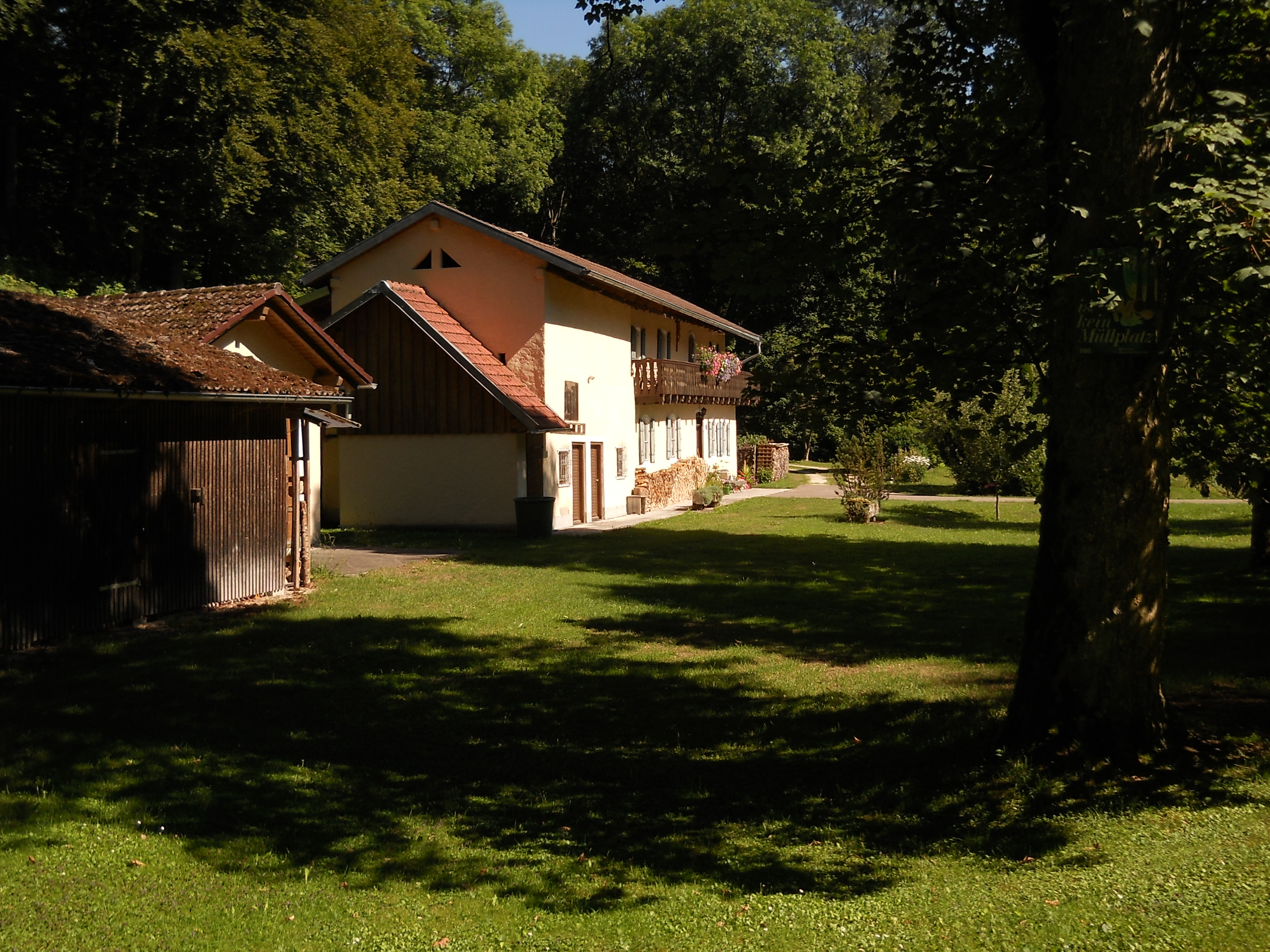 Affenthal, Gemeindeteil von Walting im Landkreis Eichstätt, Oberbayern